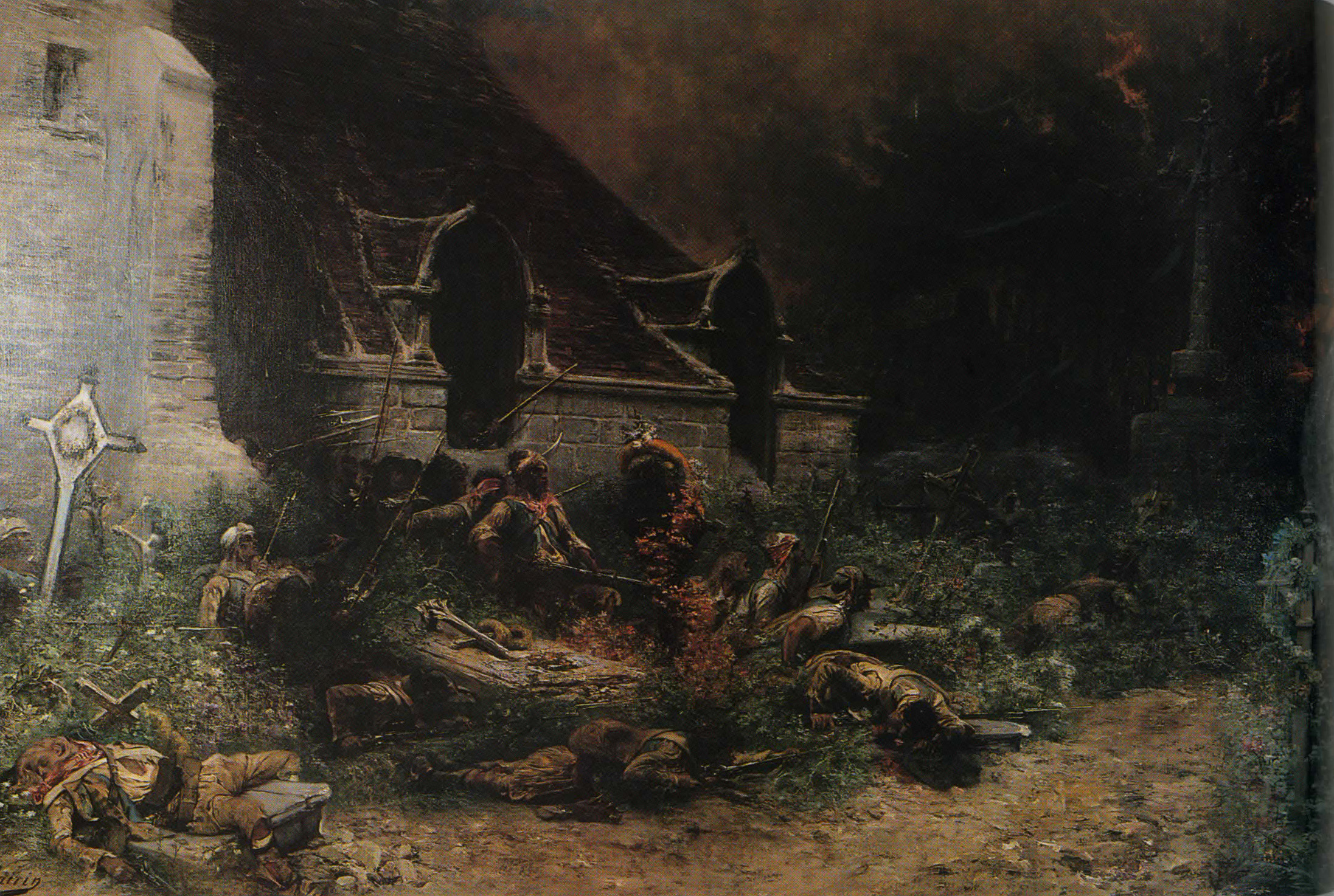 Guerre de Vendée.